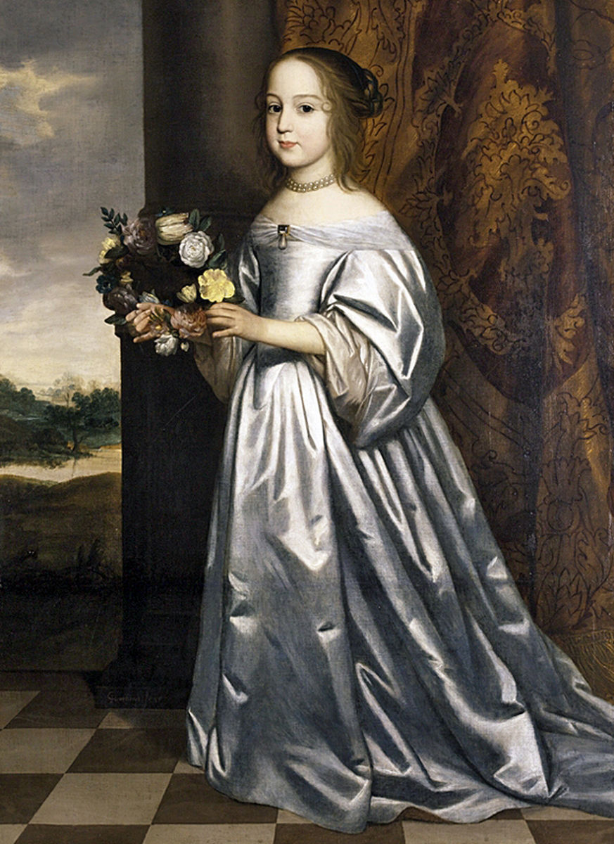 Portret van Henrietta Françisca Prinses van Hohenzollern